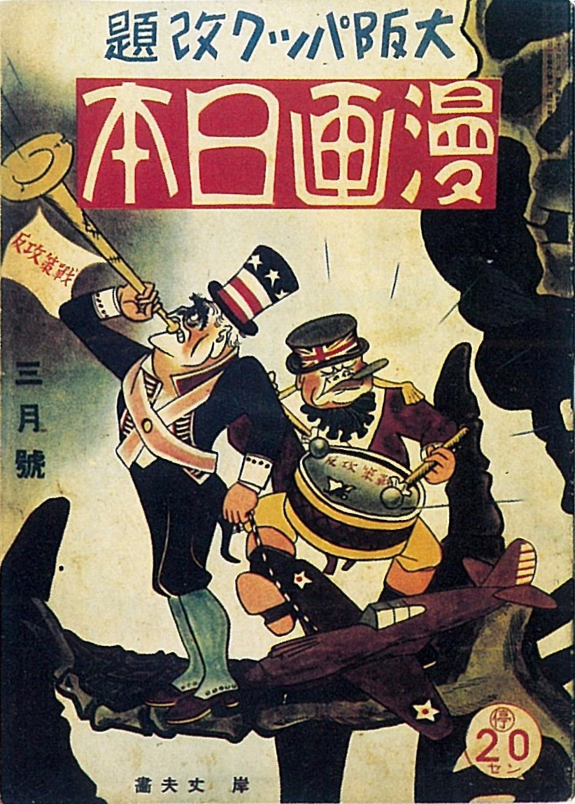 『漫画日本』 1943年（昭和18年）3月号